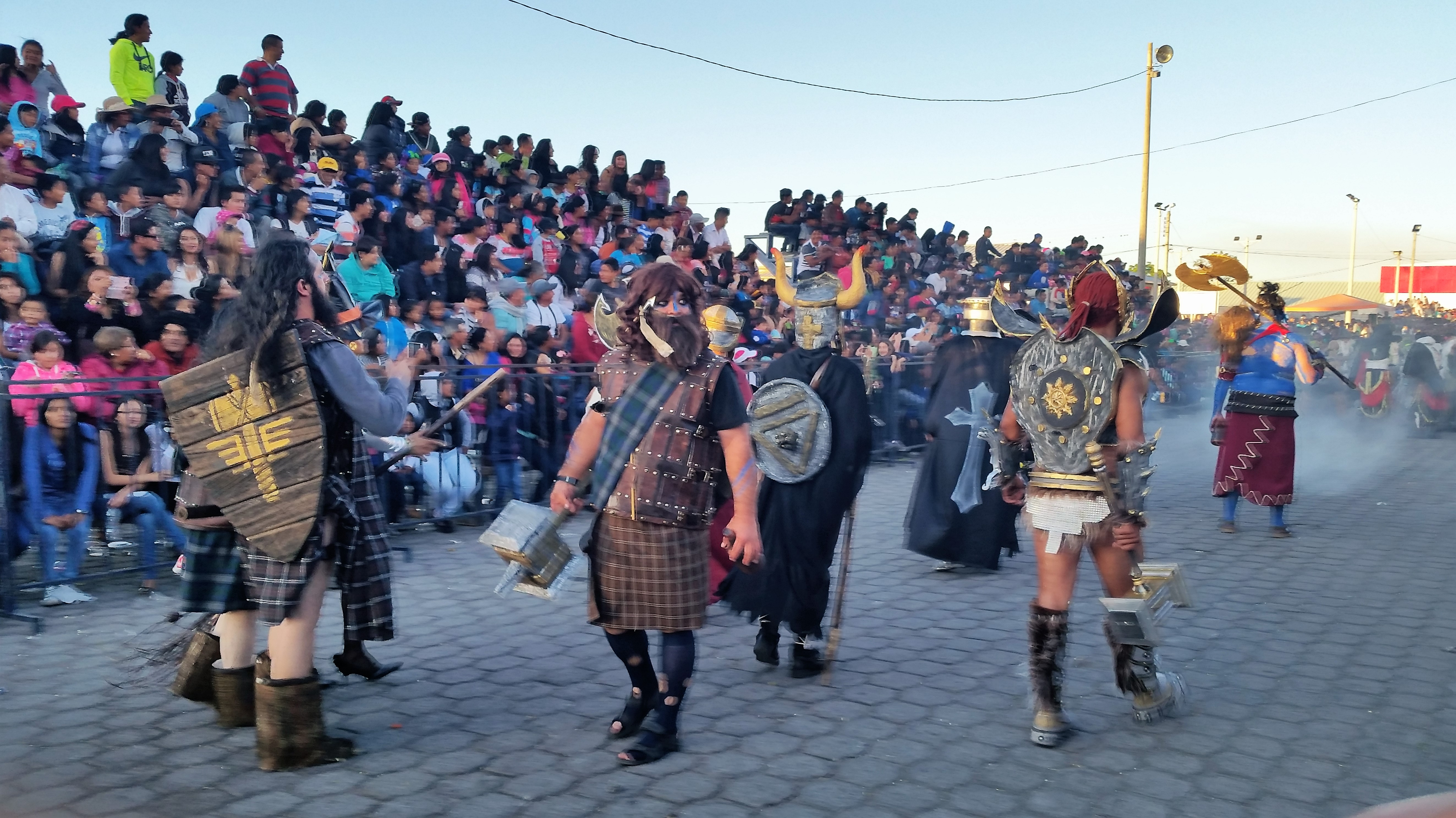 Desfile de Comparsas de Año Viejo (31 de Diciembre) en Atuntaqui (Provincia de Imbabura)